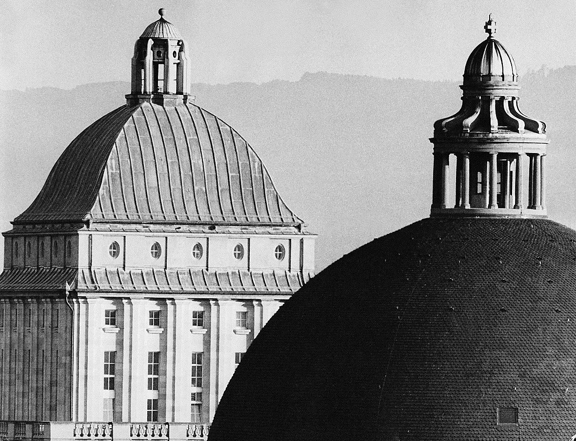 Kollegienhaus Tower and ETH Tower in Zurich